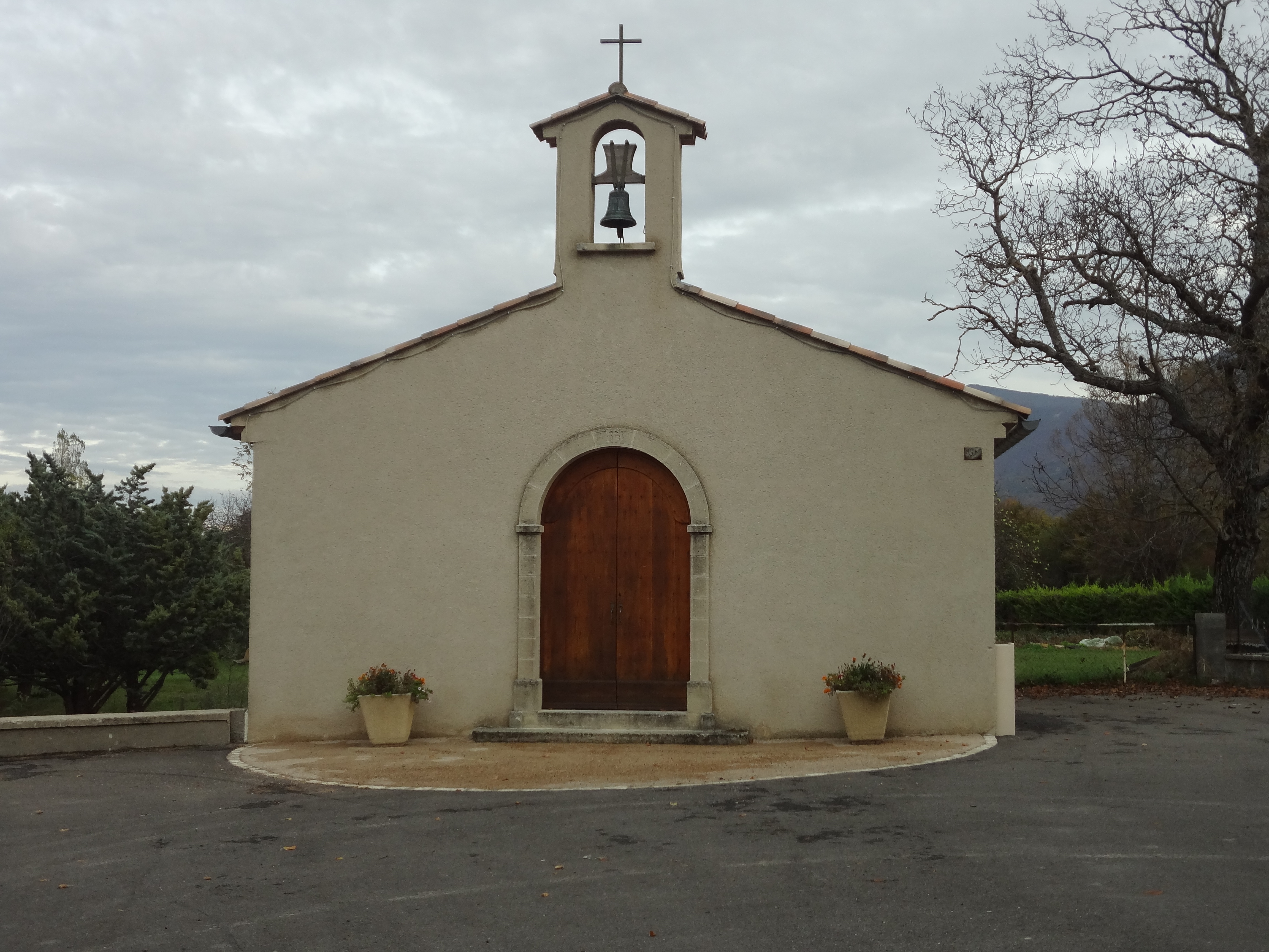 église Saint-Pierre-aux-Liens des Omergues